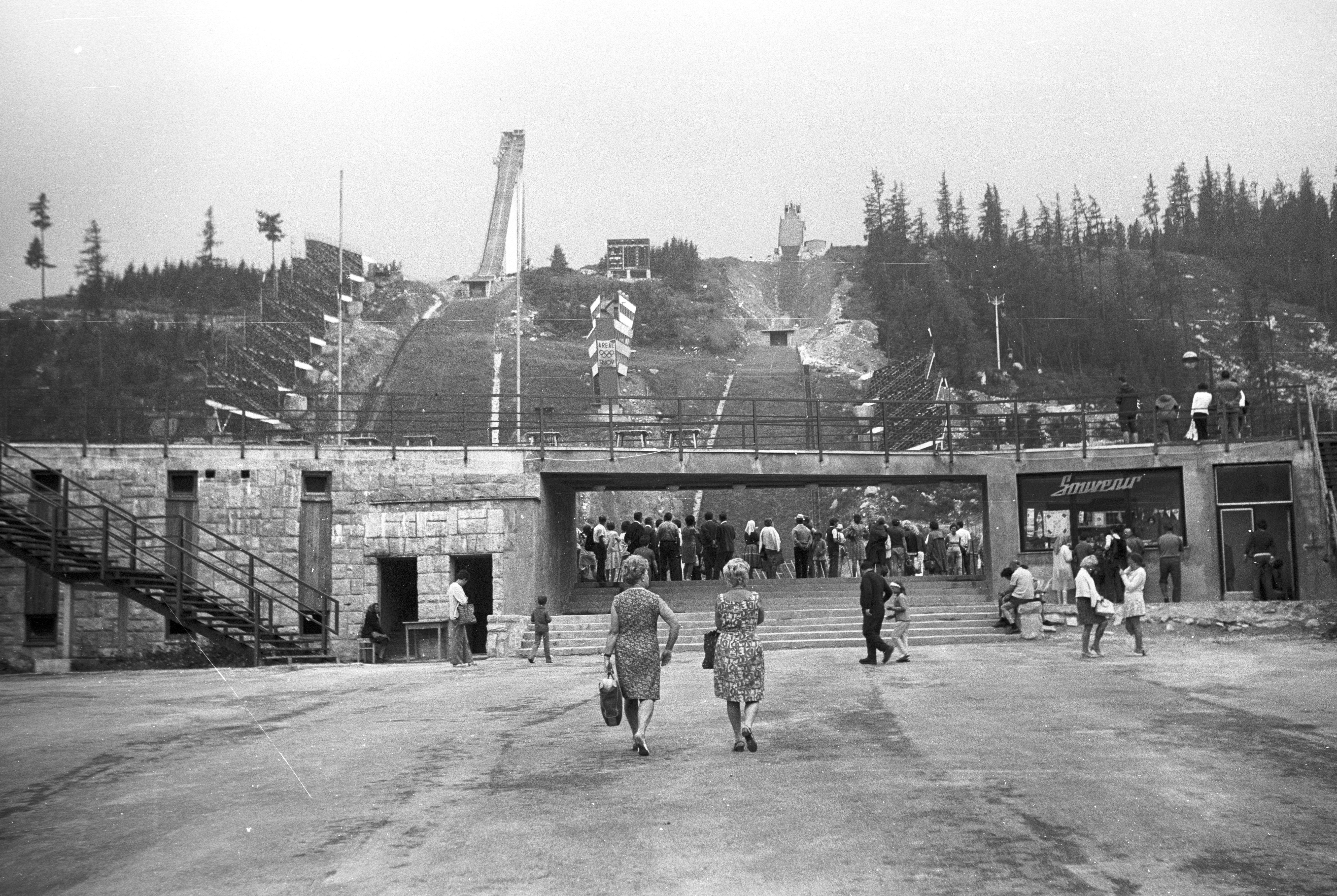 Síugrósánc.